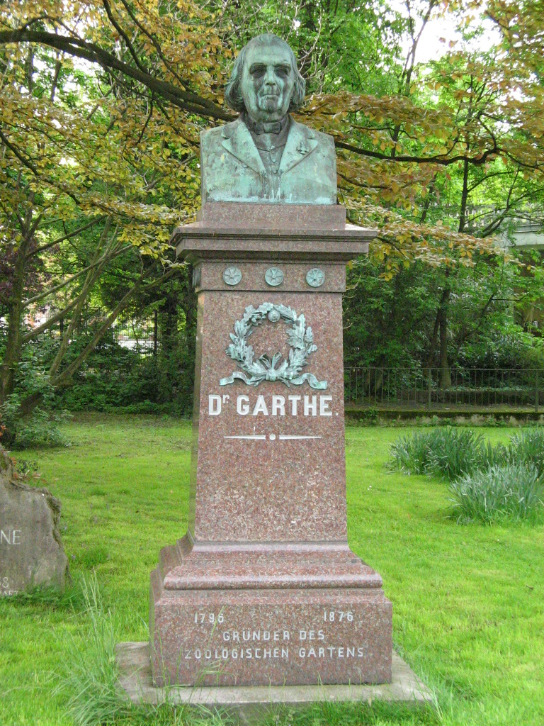 Denkmal von dem Gründer des Kölner Zoos Dr. Caspar Garthe Künstler: Anton Werres (1830–1900) Description German artist deutscher BildhauerDate of birth/death1 January 183027 April 1900Location of birth/deathCologneCologneWork locationCologne, RomAuthority control VIAF: 81616740 ULAN: 500088900 GND: 137423101